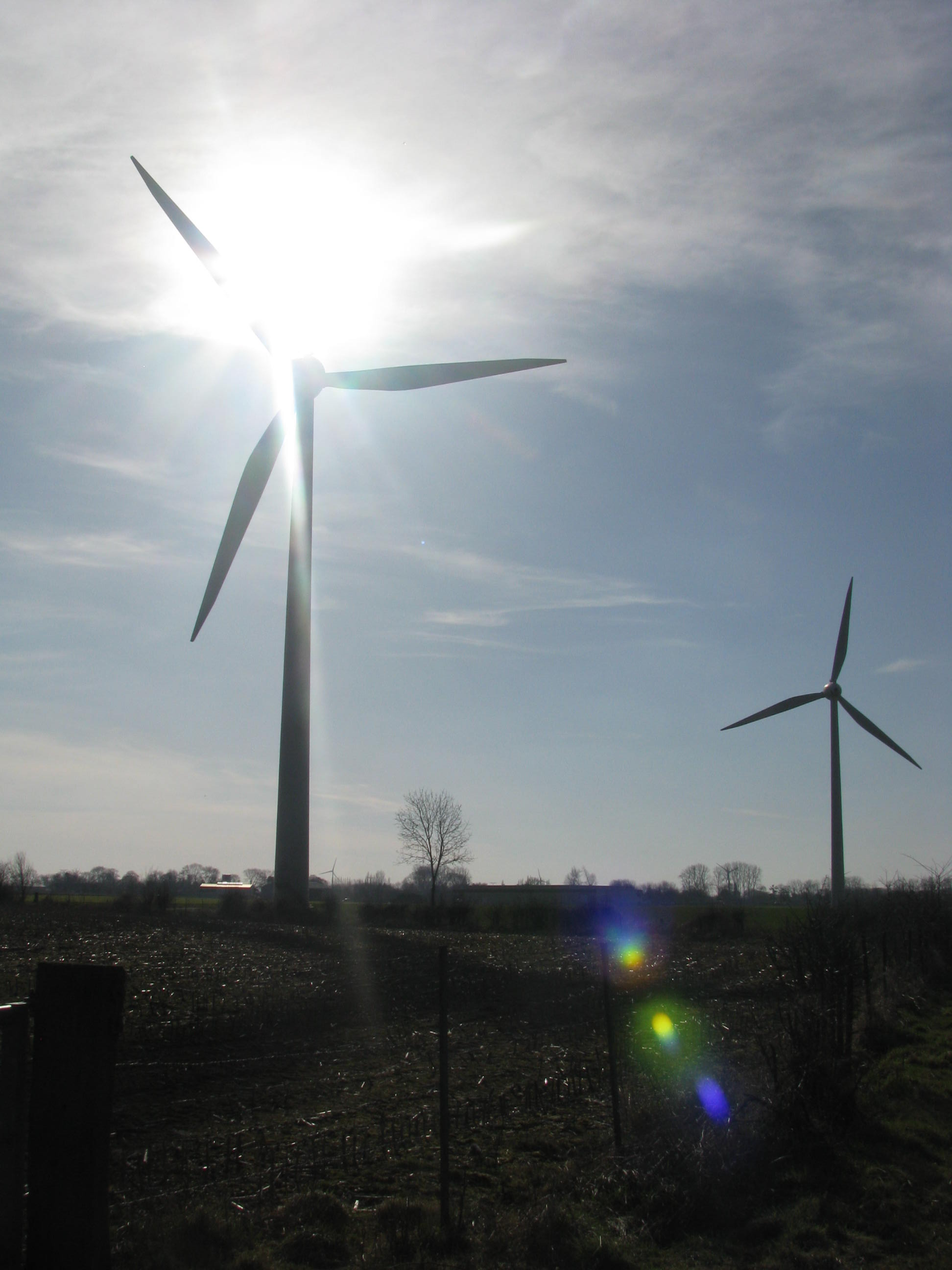 Les deux éoliennes de Chepy.